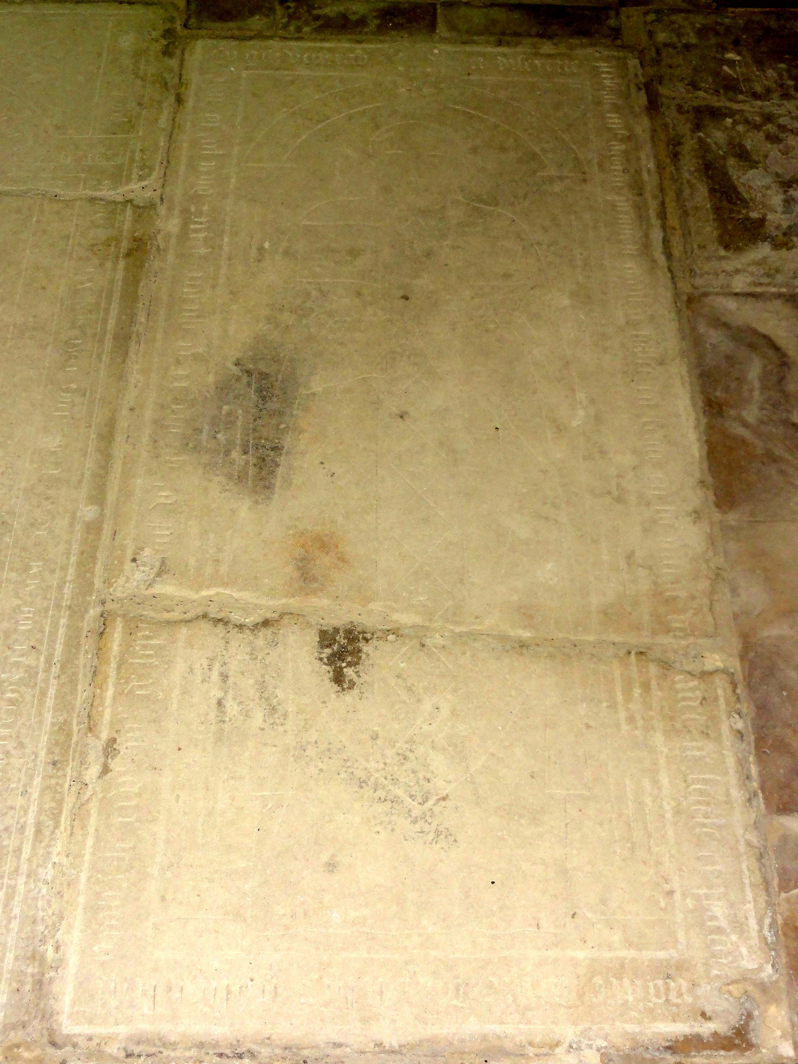 Bas-côté sud, dalle funéraire de Georges Pruvost, vicaire, mort en 1584.